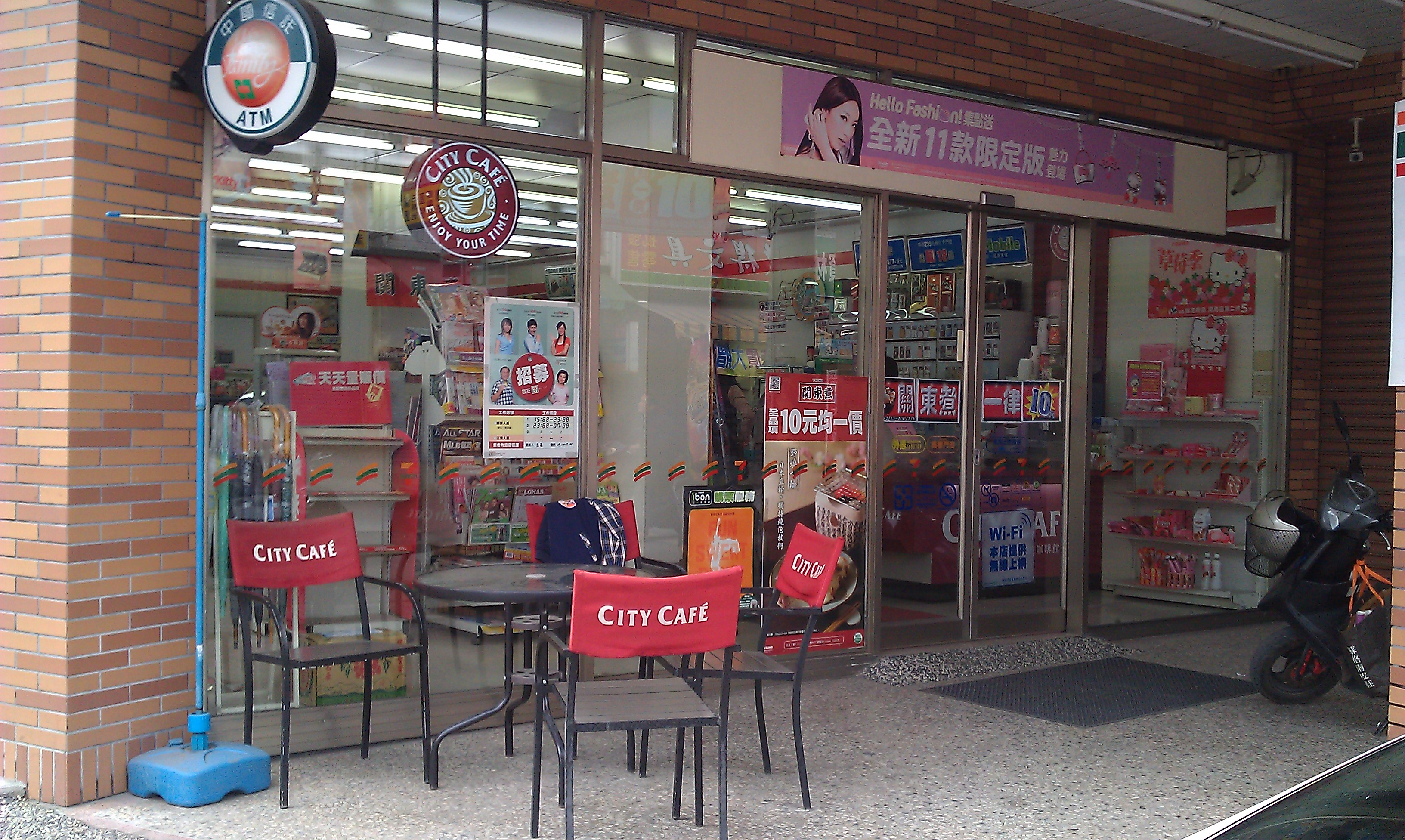 統一超商高樹門市，地址：屏東縣高樹鄉興中路193號。